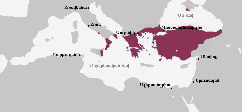 Բյուզանդական կայսրությունը 867